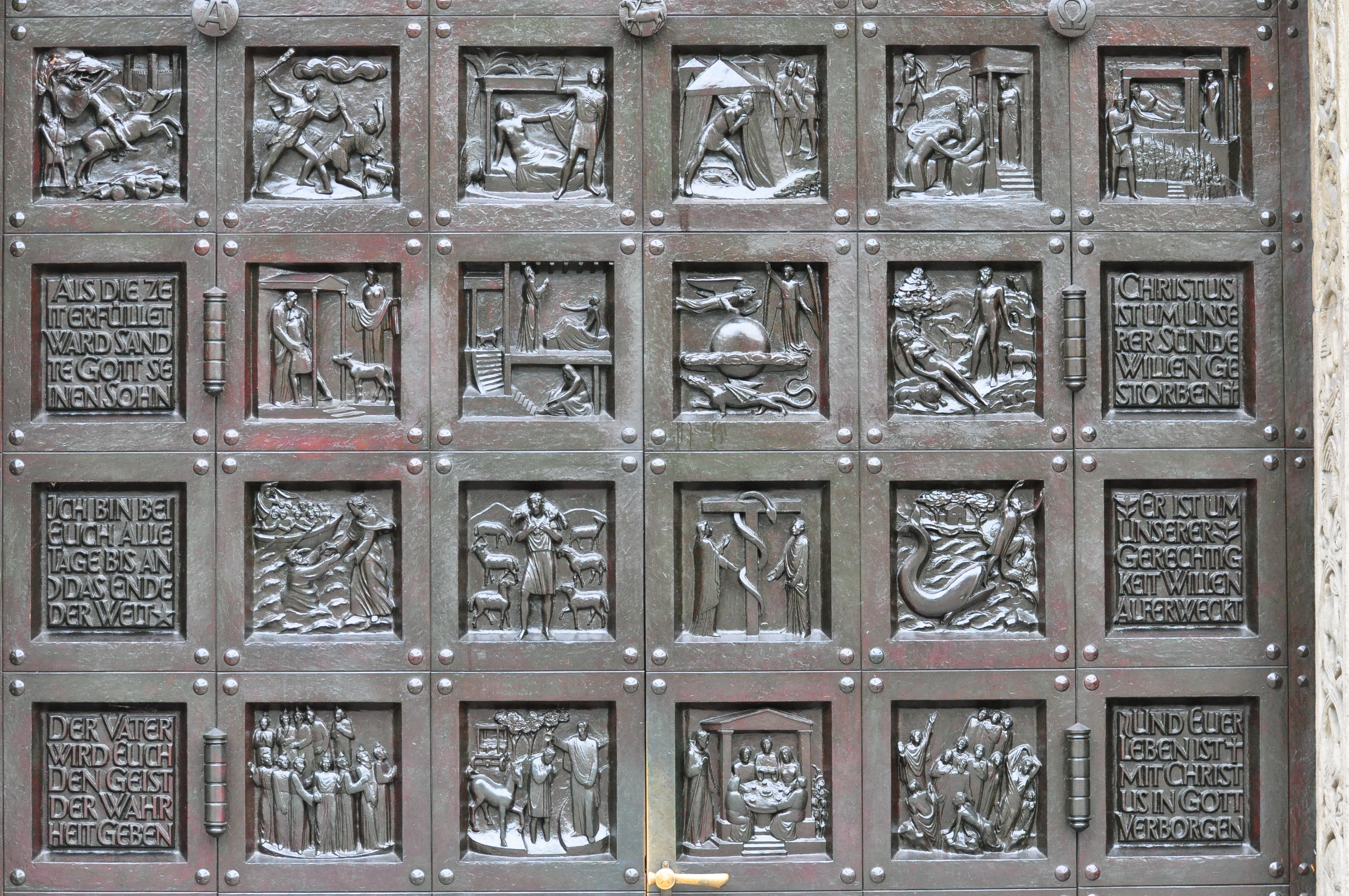 Grossmünster in Zürich (Switzerland)